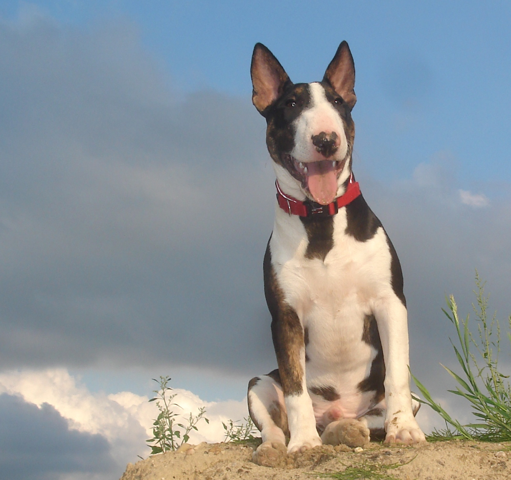 Mini Bull Terrier, 26 weeks old, color black, brindle & white commonly refered as black brindle and white, Named Bully Boy